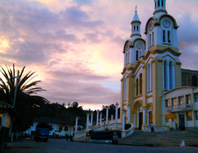 Foto de la iglesia de Boavita